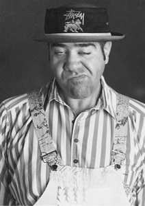 uomo pensieroso